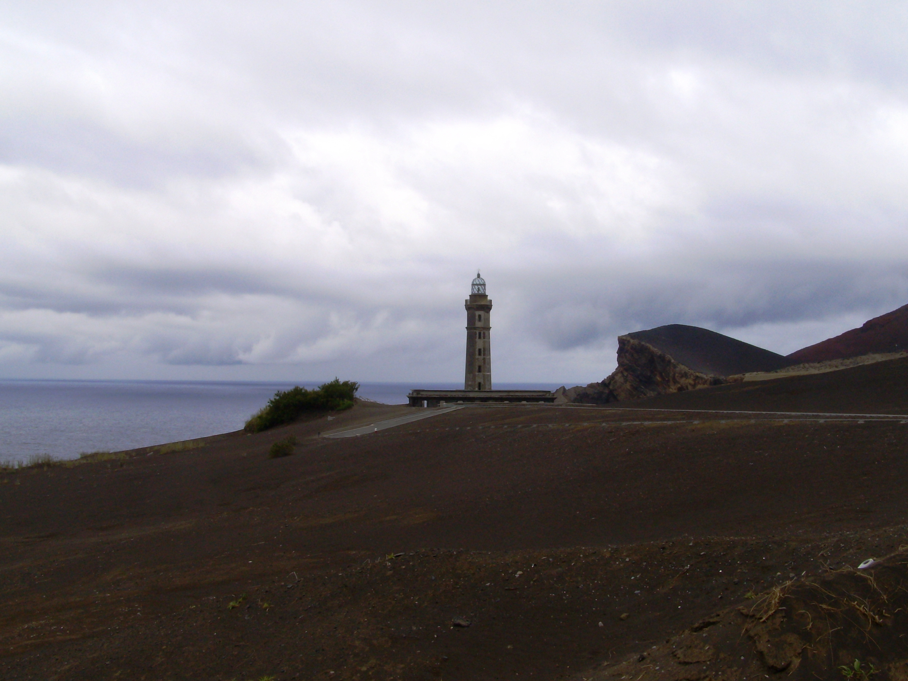 Farol dos Capelinhos, ponta dos Capelinhos, ilha do Faial, Açores.